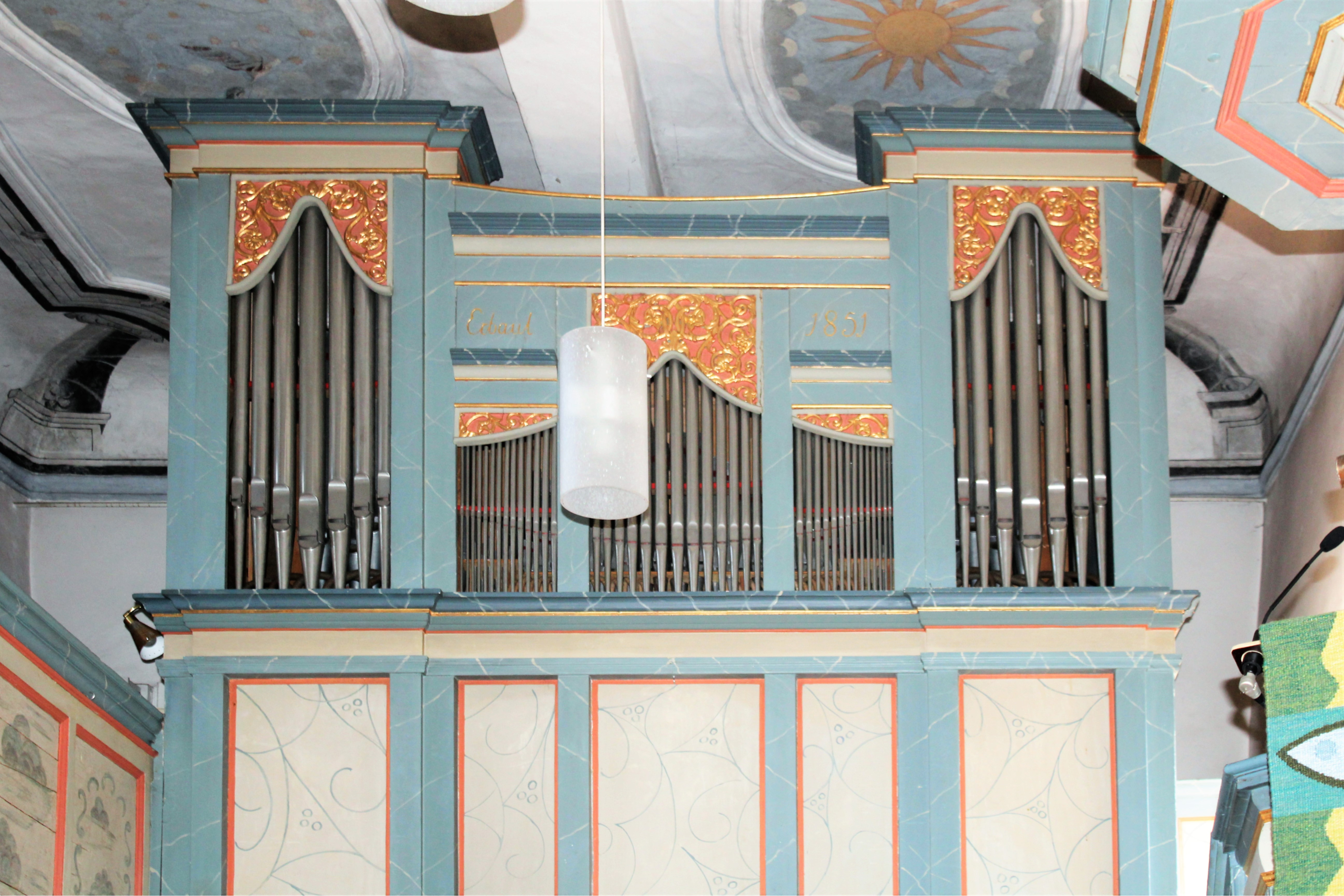 Evangelische Kirche Blasbach, Wetzlar, Lahn-Dill-Kreis, Hessen, Deutschland